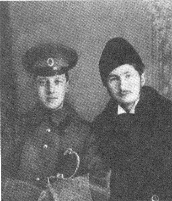 Фото: русские поэты Н.Гумилёв и С.Городецкий.